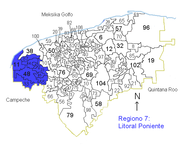 La bildo montras la situon de la regiono 7, Litoral Poniente en Yucatán. Kategorio:Geografio de Yucatán